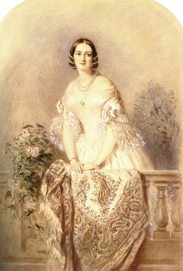 Завадовская Елена Михайловна (графиня, 1838)